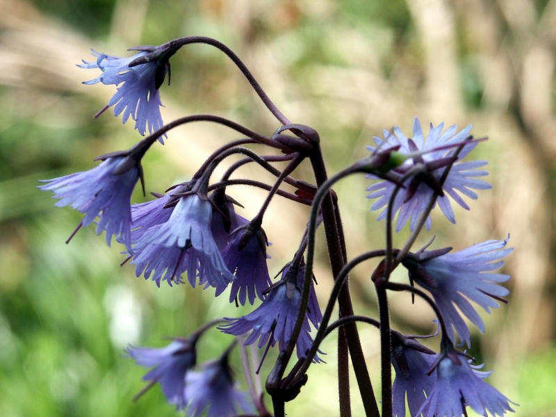 květy dřípatky horské Soldanella montana